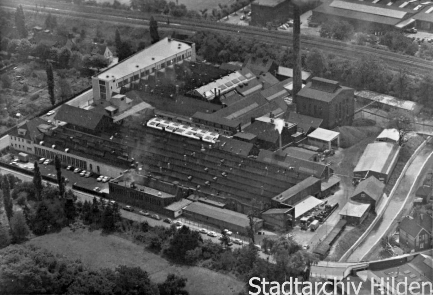 Luftaufnahme der Stückfärberei Schlieper & Laag, Hofstraße/Neustraße, Hilden